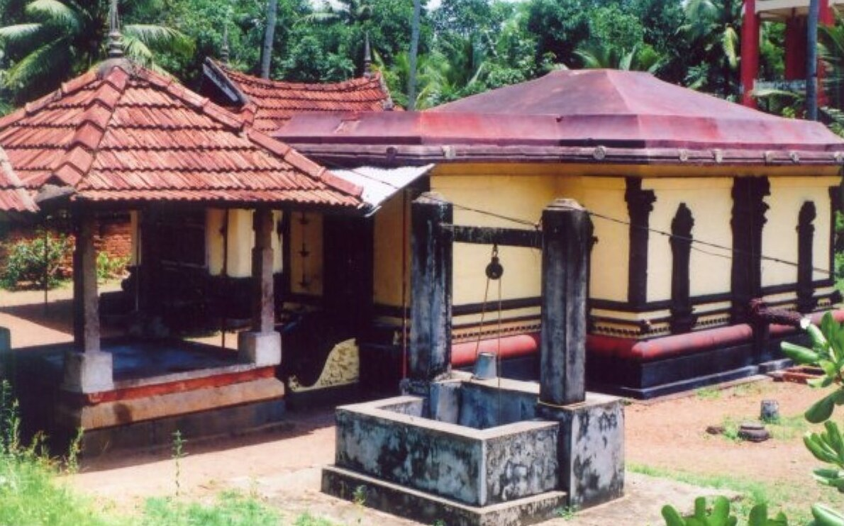 നിരണം തൃക്കപാലീശ്വരം മഹാദേവക്ഷേത്രം